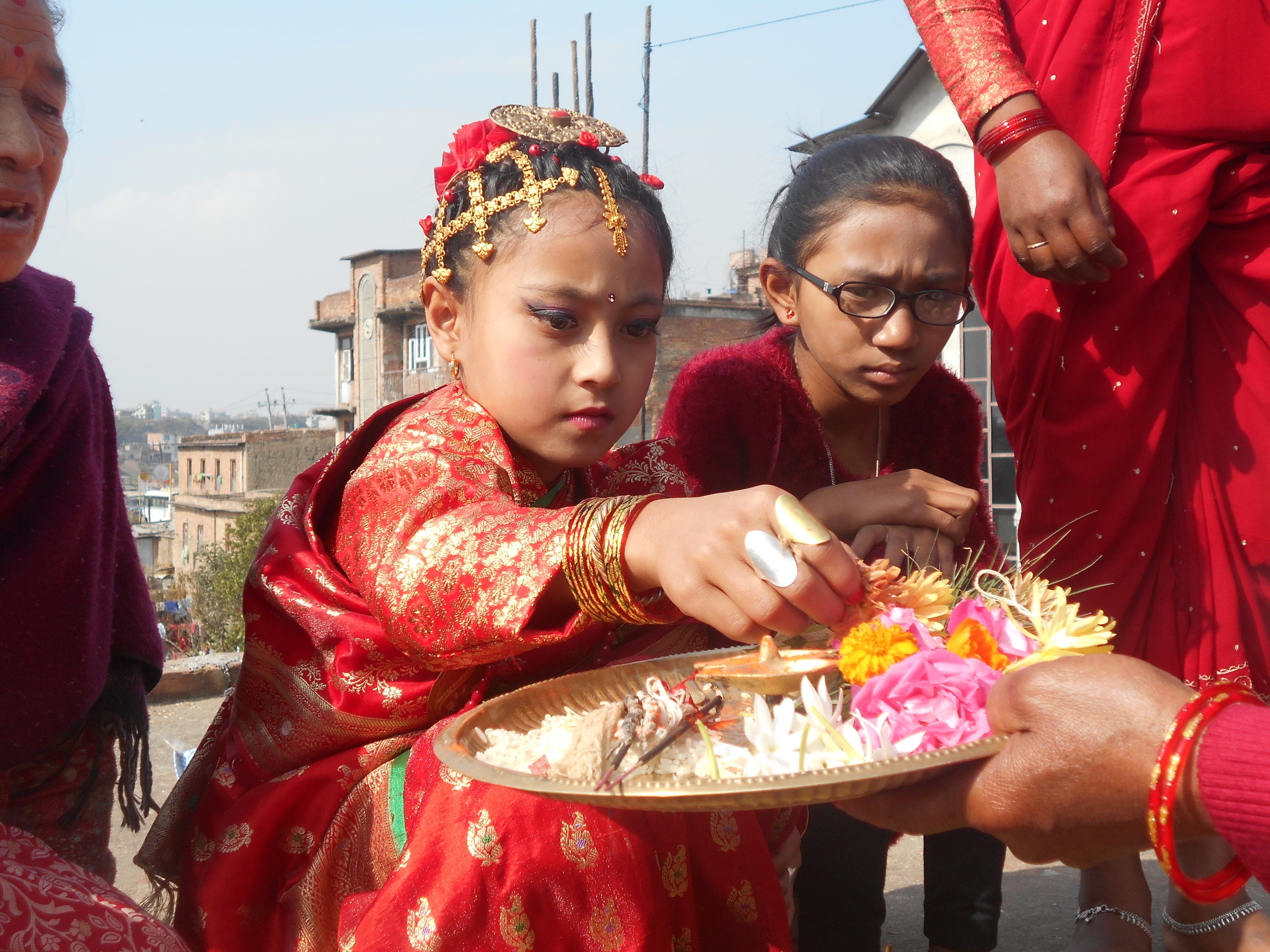 नेपाली: सुर्यदर्शन (गुफा राख्ने)